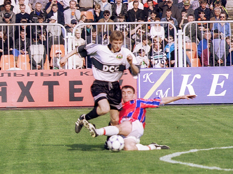 Фотография с диска Анастасии Федоренко «Донецк. Увидеть и полюбить». ФК «Шахтёр» Донецк